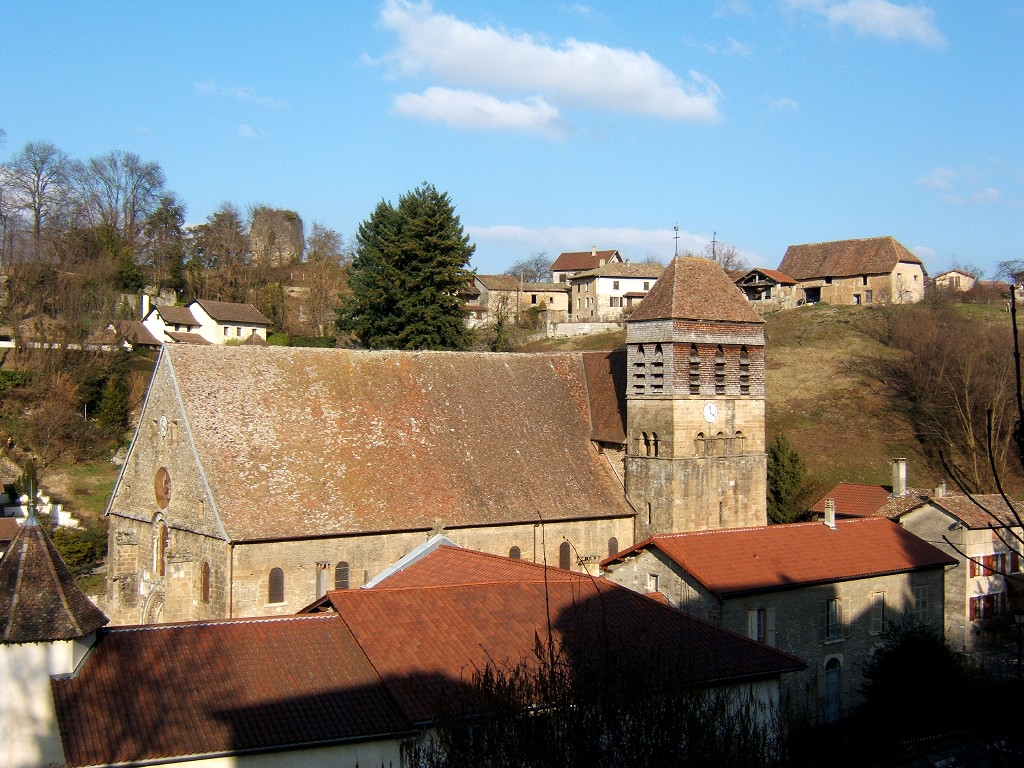 Vue Générale de Saint-Chef (Isère, France) - Au centre, l'église abbatiale. Au fond, on distingue (sur la gauche) la Tour du Poulet et (tout à droite) une ferme typique en pisé.